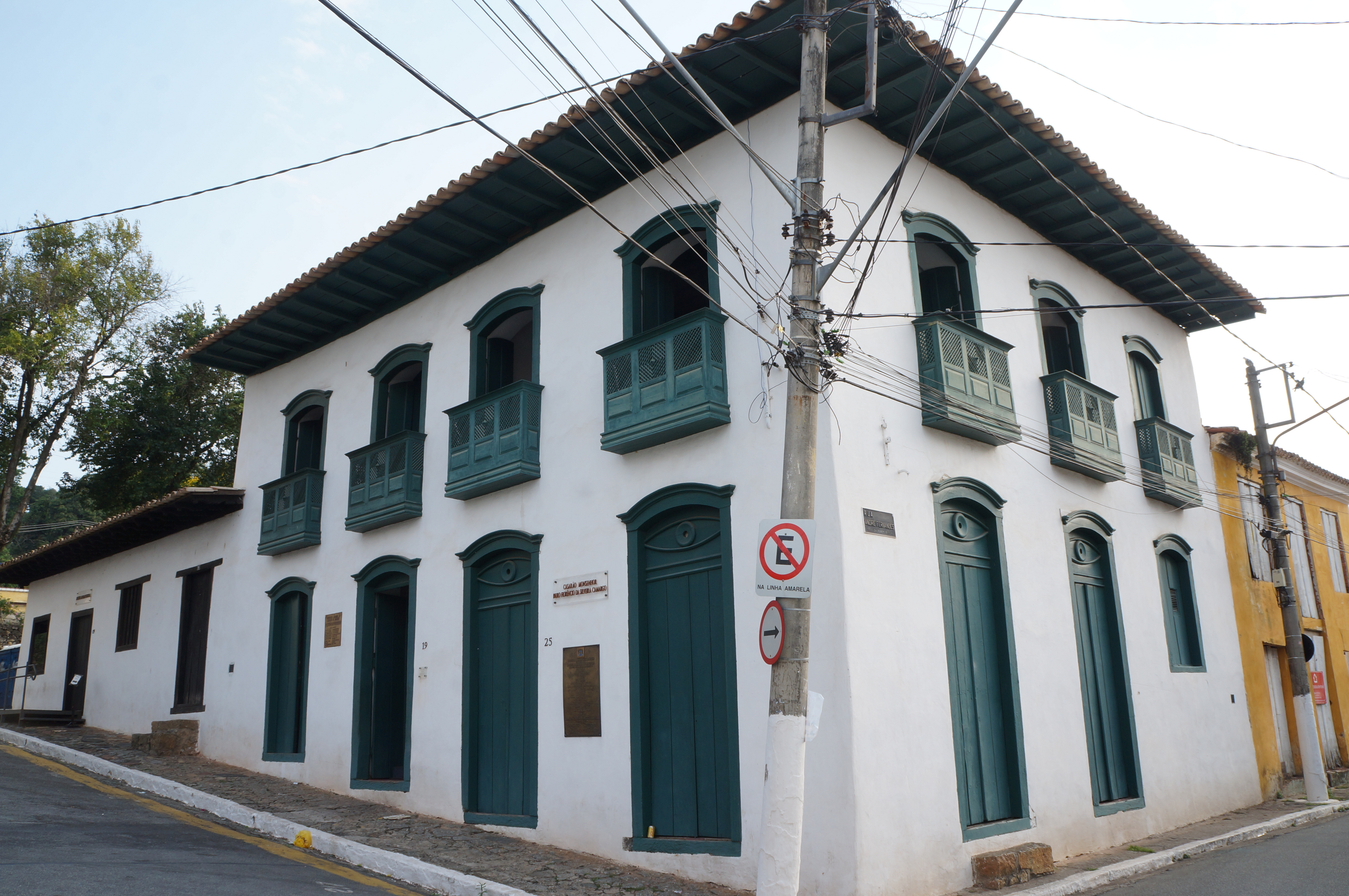 Casa à Praça da Matriz, 19 e 25